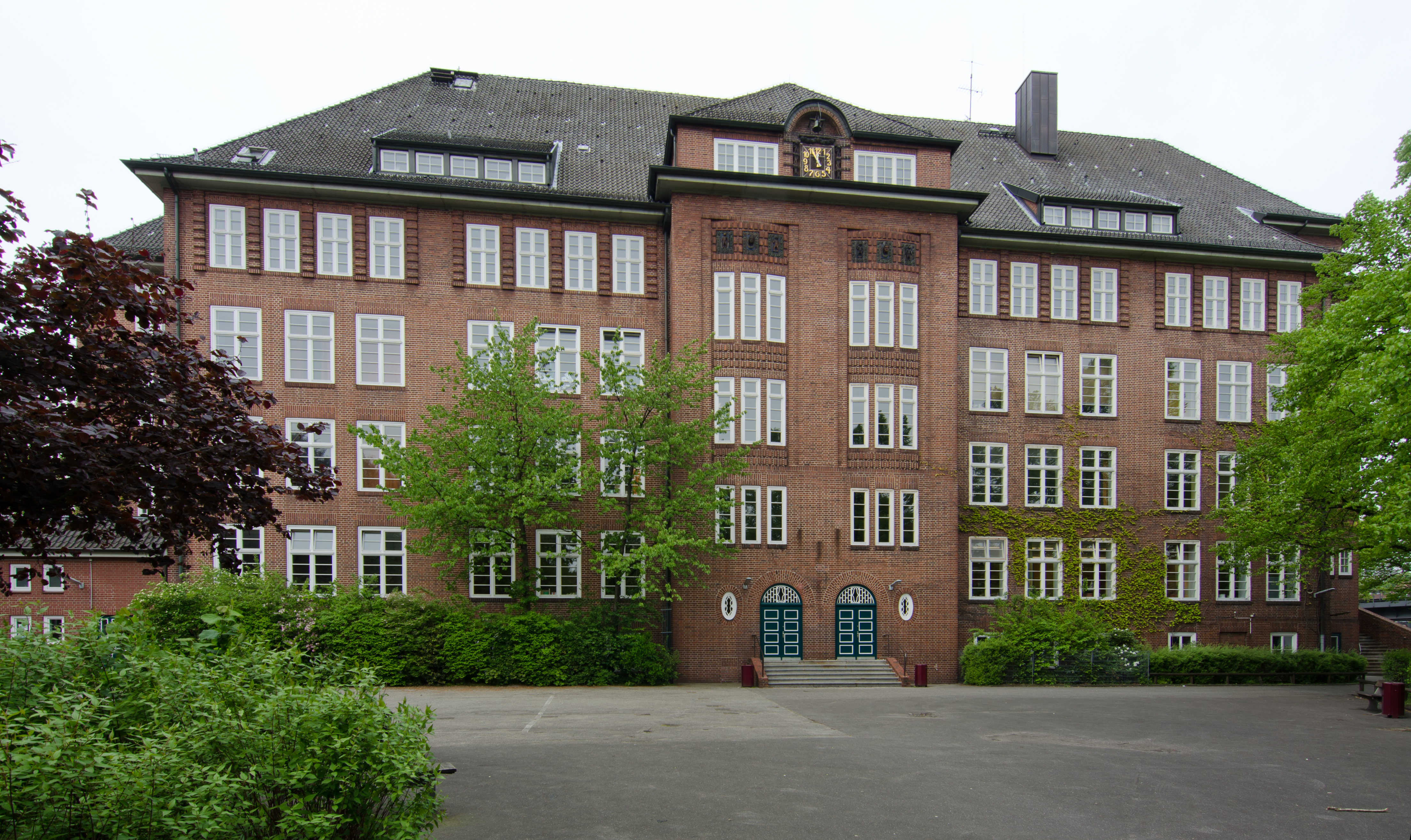 Schule Tieloh Rückseite